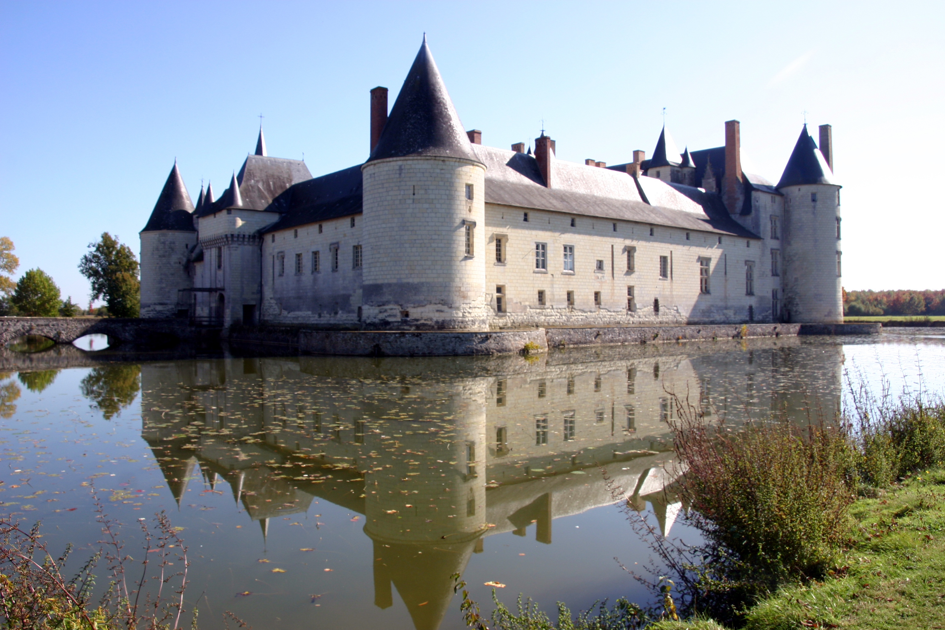 Schloss Plessis-Bourré